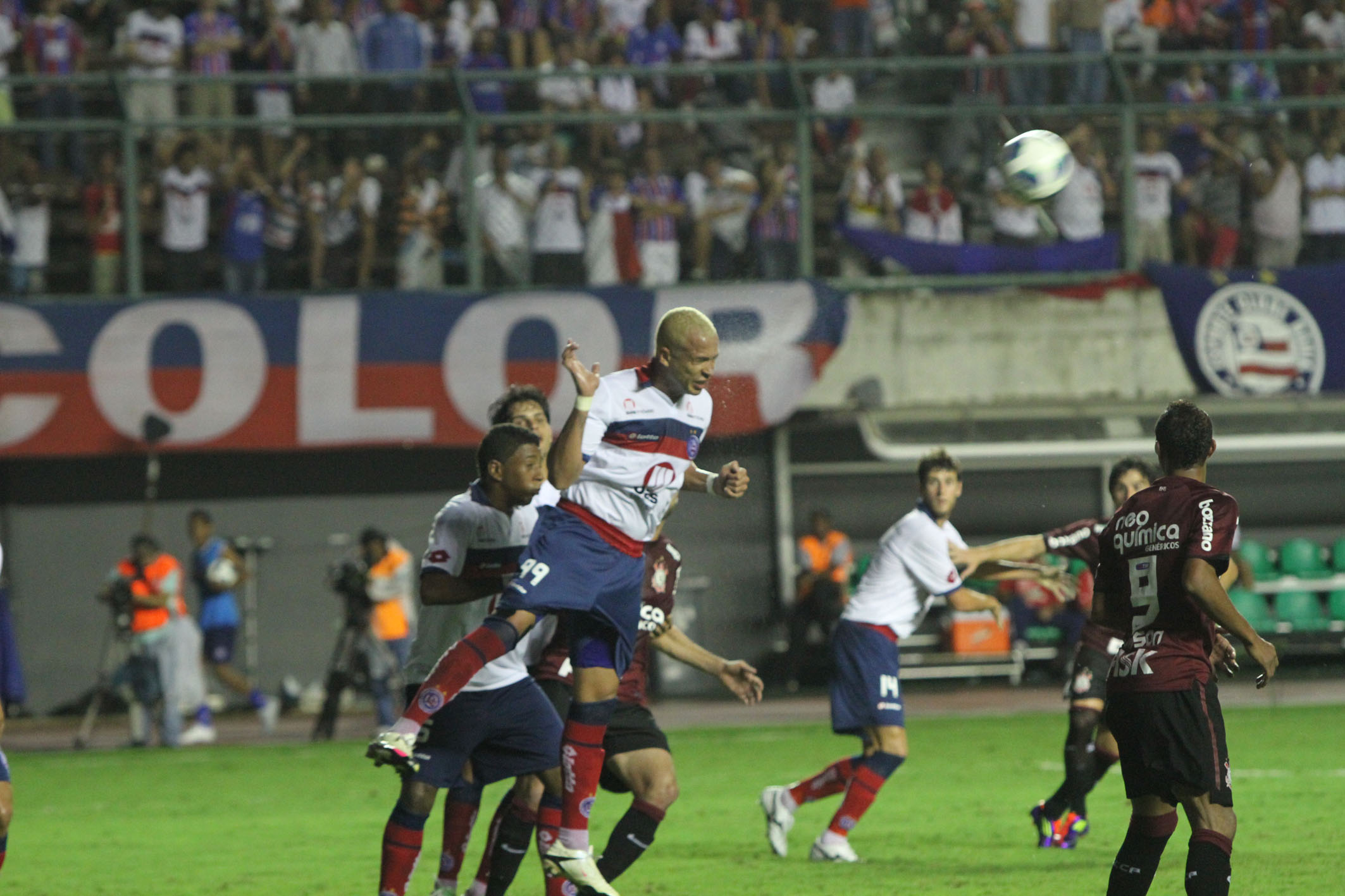 Governo e Esporte Clube Bahia fecham apoio ao Pacto pela Vida Na foto Bahia e Corinthians Foto Adenilson Nunes Local Estádio de Pituaçu Salvador.